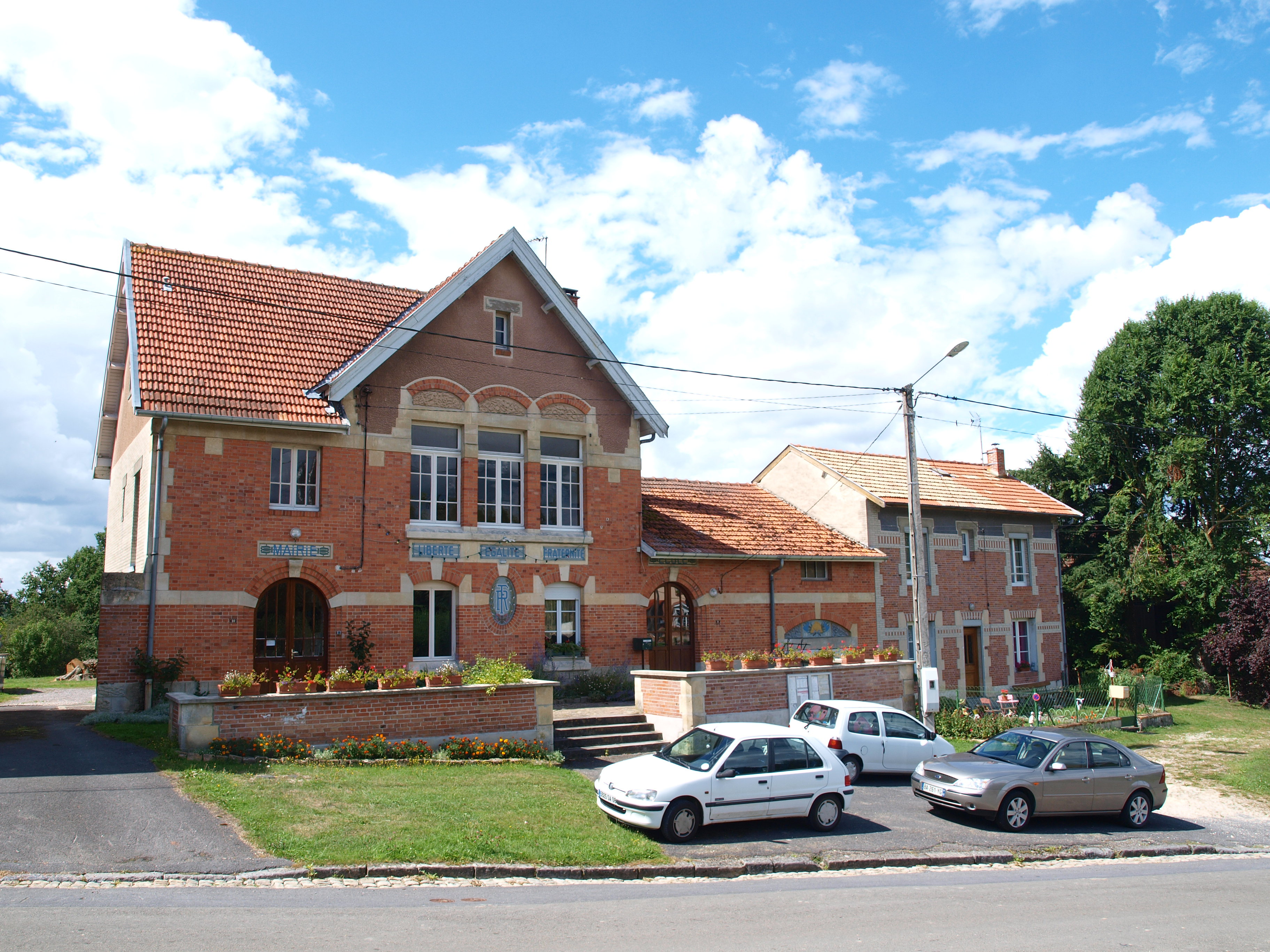 Condé-lès-Autry (Ardennes, France) ; mairie